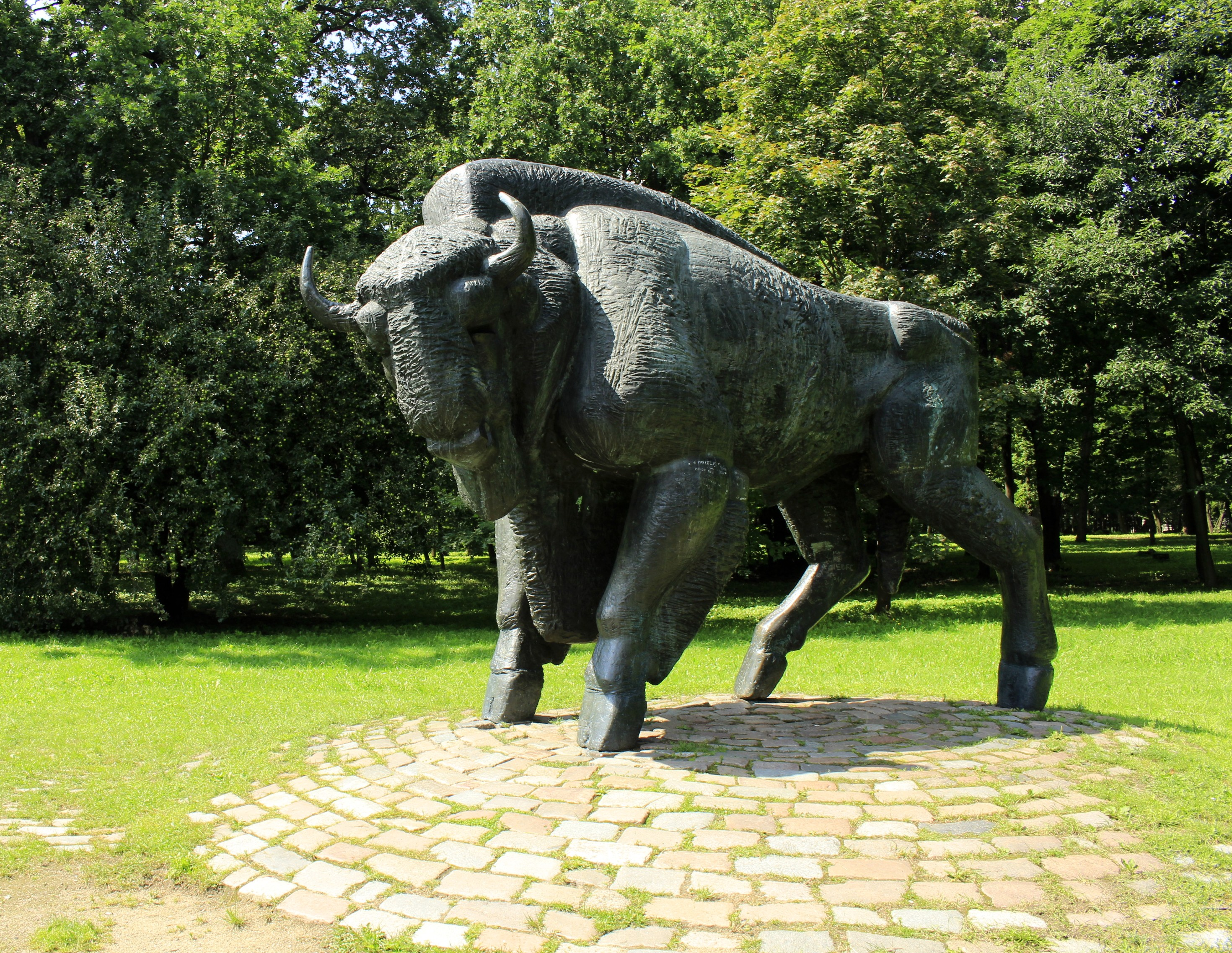 Stumbro skulptūra Ąžuolyne